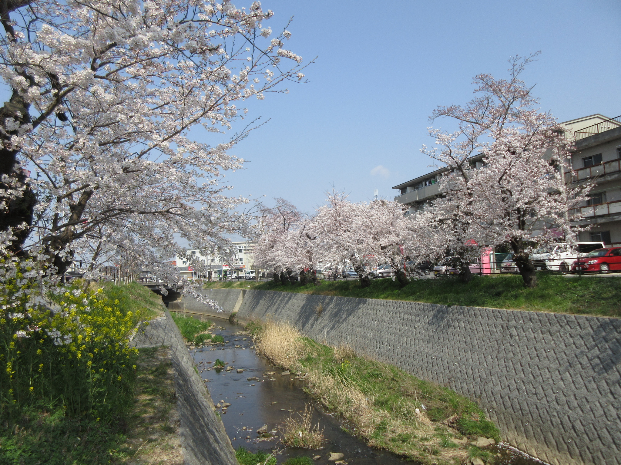 伊賀川桜堤。岡崎市伊賀町にて撮影。